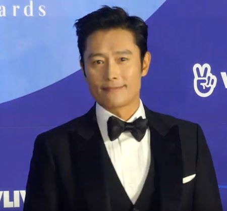 5월 1일 오후 서울시 강남구 삼성동 코엑스에서 제 55회 백상예술대상 시상식 레드카펫 행사가 열렸다